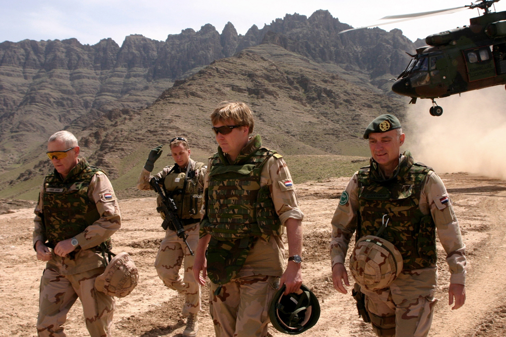 De eerste Koningsdag wordt zaterdag 26 april gevierd. Hoewel Koning Willem-Alexander met het aanvaarden van de troon afstand deed van zijn militaire status, blijft de hechte band tussen het Koningshuis en de krijgsmacht bestaan.